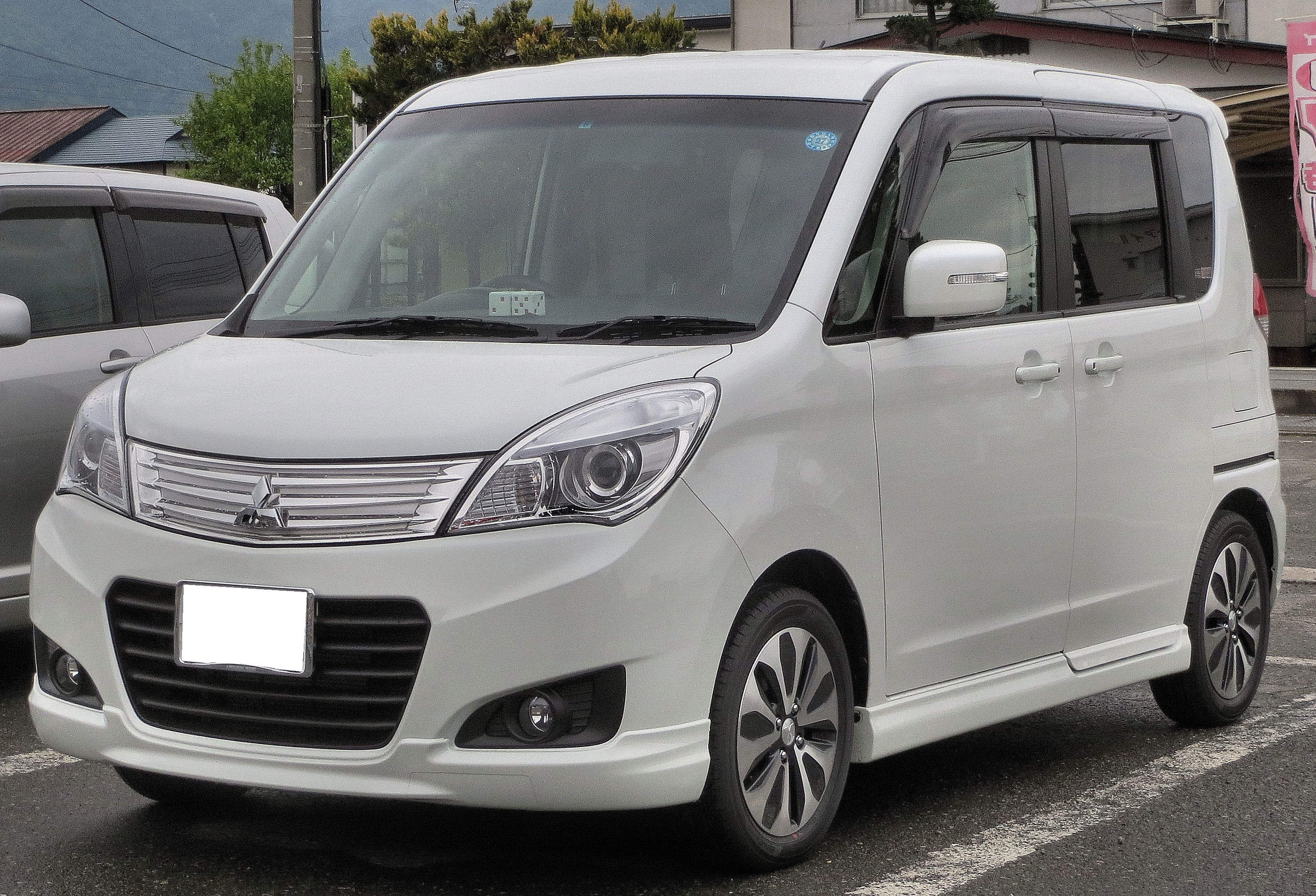 三菱・デリカD:2 S(後期型)